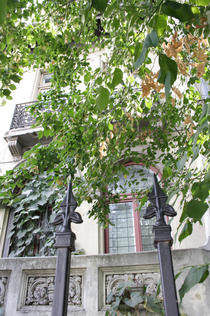 Casă, Str. Alexandrescu Grigore 14 sector 1